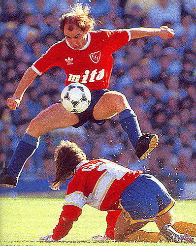 Ricardo Bochini en 1988 con Independiente.